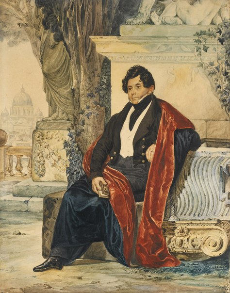 Александр Петрович Собакин (1798—1837), камергер, последней представитель старинного боярского рода. Karl Pavlovich Briullov 1799-1852 PORTRAIT OF A GENTLEMAN signed in Latin and dated 1826 D. m.l. watercolour on card 33.5 by 26.5cm, 13 1/4 by 10 1/2 in. This superb portrait is among the earliest recorded from the period Briullov spent in Italy between 1823 and 1835. He grew immensely popular with members of both the Russian and Italian aristocracy and in his correspondence with the Society for the Encouragement of the Arts, which initially sponsored his trip, Briullov reports that he is so inundated with commissions that he is unable to fulfil all of them. Watercolour portraits gained popularity during the 1820s and 1830s, but Briullov's exceptionally fine examples 'stand out from the work of his contemporaries with the complexity of the composition and palette' (E.Petrova (ed.), K.P.Briullov, St Petersburg, p.30). Unafraid to use dark tones, he would build up layers of paint to model the features of his sitters; the saturated colours of the garments of the present sitter and the surrounding vegetation are characteristic of his Roman watercolours. As Petrova points out, his treatment of watercolour is not so very different to his use of oil and the resulting portraits often feel as though they are painted on miniature canvases. The dome of St Peter’s seen in the distance of the present portrait appears as a backdrop in his Portrait of Countess Saltykova (fig.1) and in Portrait of Mr and Mrs Olenin (fig.2). As a rule, the settings of Briullov’s watercolour portraits are imaginary, but he would integrate classical elements copied diligently in the Vatican museums or the Roman Forum. In the present lot the balustrade on the left and the vista beyond suggest that Passeggiata del Pincio on the Pincian Hill may have been the inspiration at least for the setting, a public space which was created the year Briullov arrived in Italy.